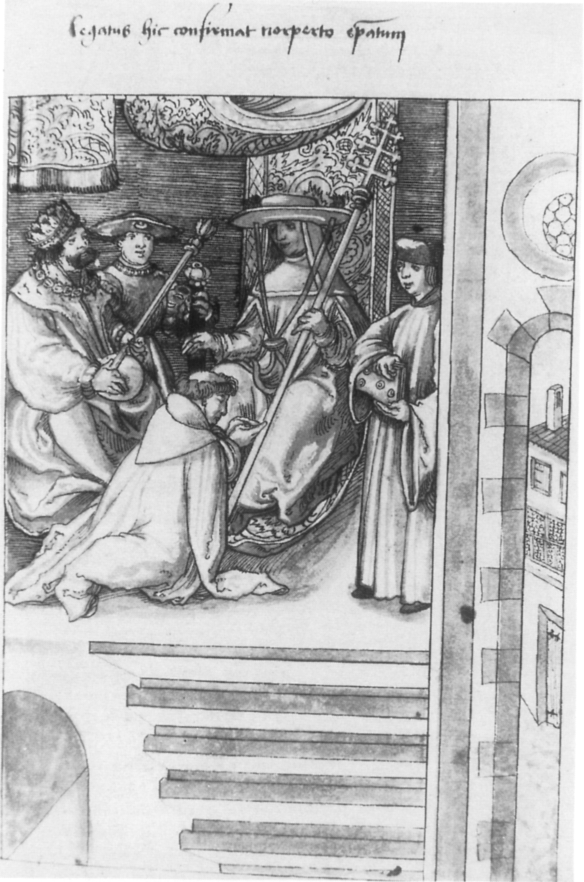 Bestätigung der Wahl Norberts von Xanten zum Erzbischof von Magdeburg durch den päpstlichen Legaten Gerardo di Santa Croce (den späteren Papst Lucius II.); aus dem Norbert-Zyklus im so genannten Traditionskodex aus Kloster Weißenau, heute Fürstlich Waldburg-Zeil'sches Gesamtarchiv, Schloss Zeil, ZA Ms 41; fol. 19